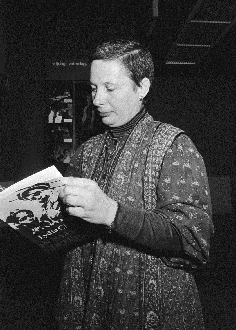 Presentatie van het boek "In naam van de Führer" van Lydia Chagoll